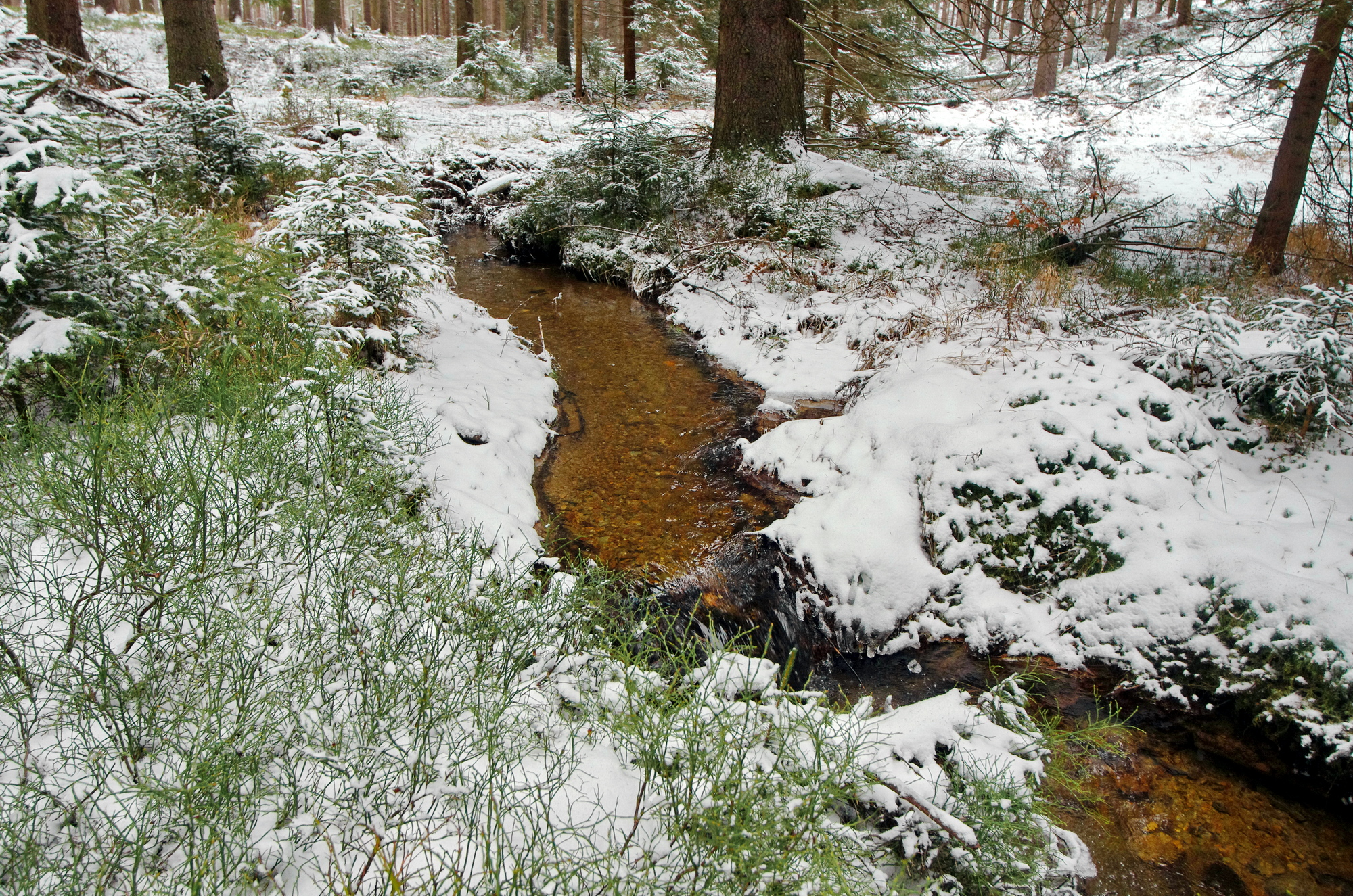 Studenecký potok v Přírodním parku Leopoldovy Hamry, Krušné hory